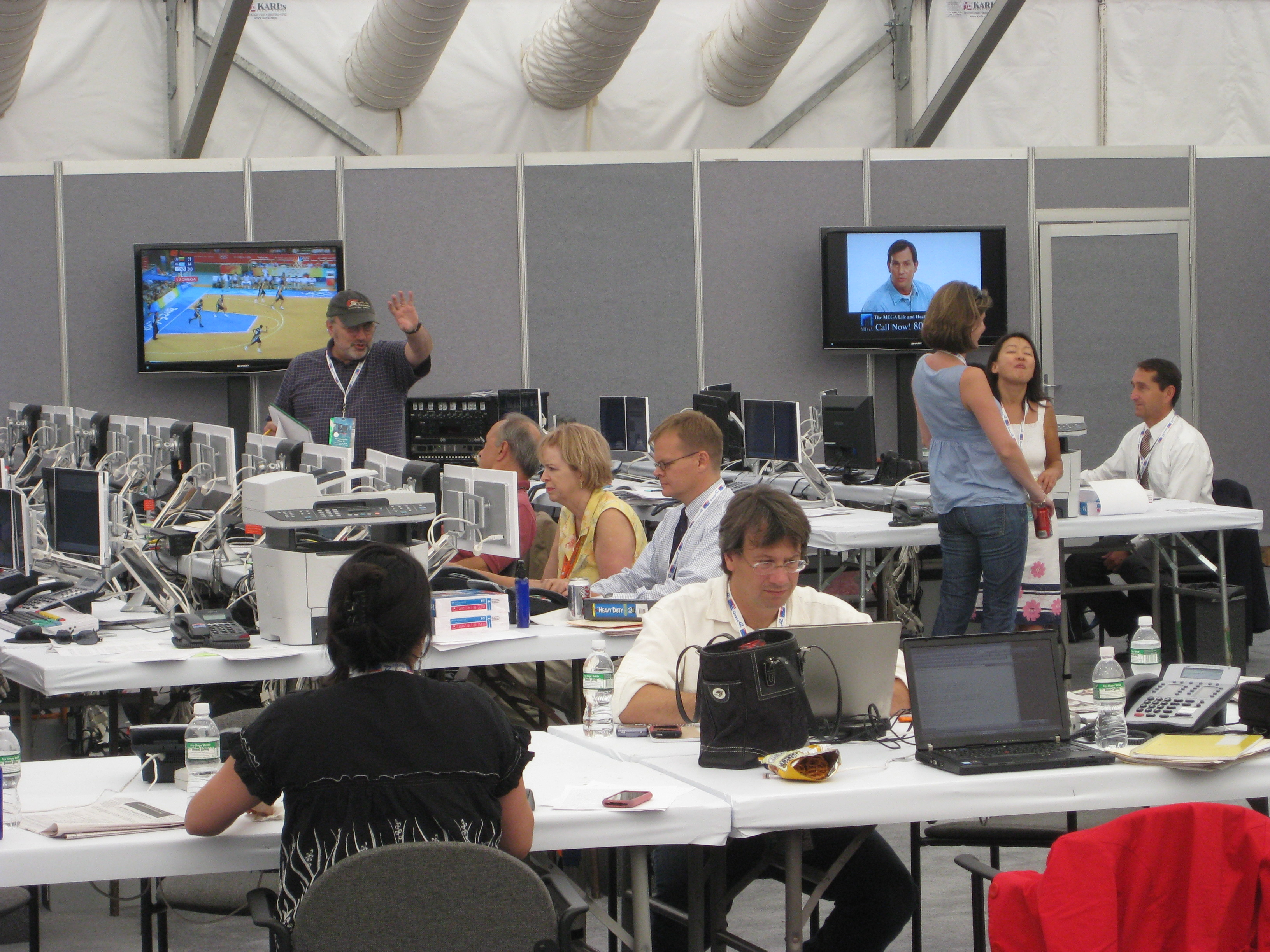 Bloomberg works openly